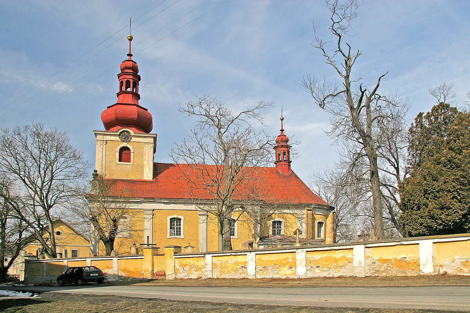 Kostel_Svatého_Gottharda_v_Žehuni, district Kolín autor: Prazak date: 24. 3. 2006